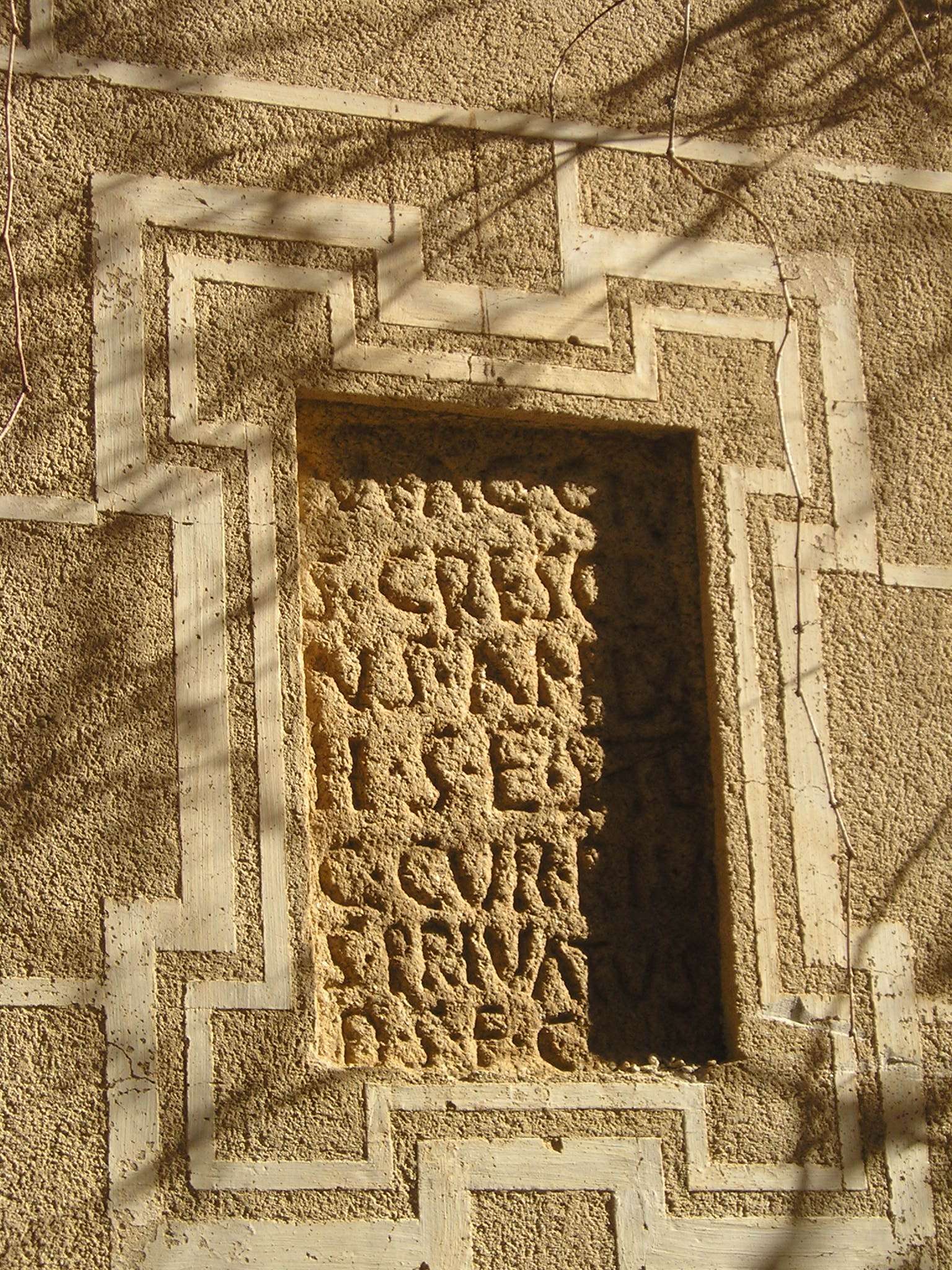 Inscrpción funeraria romana empotrada en una fachada de un palacio de Cáceres, correspondiente a CIL II, 697: M(arcus)· ACCIV/S· CRESCE/NS· AN(norum)· LX·/ H(ic)· S(itus)· E(st)· S(it)· T(ibi)· T(erra)· L(evis)·/ C(aius· CVR·RIV/S· (sic) PRIVATVS/ D(e)· S(uo)· F(aciendum)· C(Uravit)·